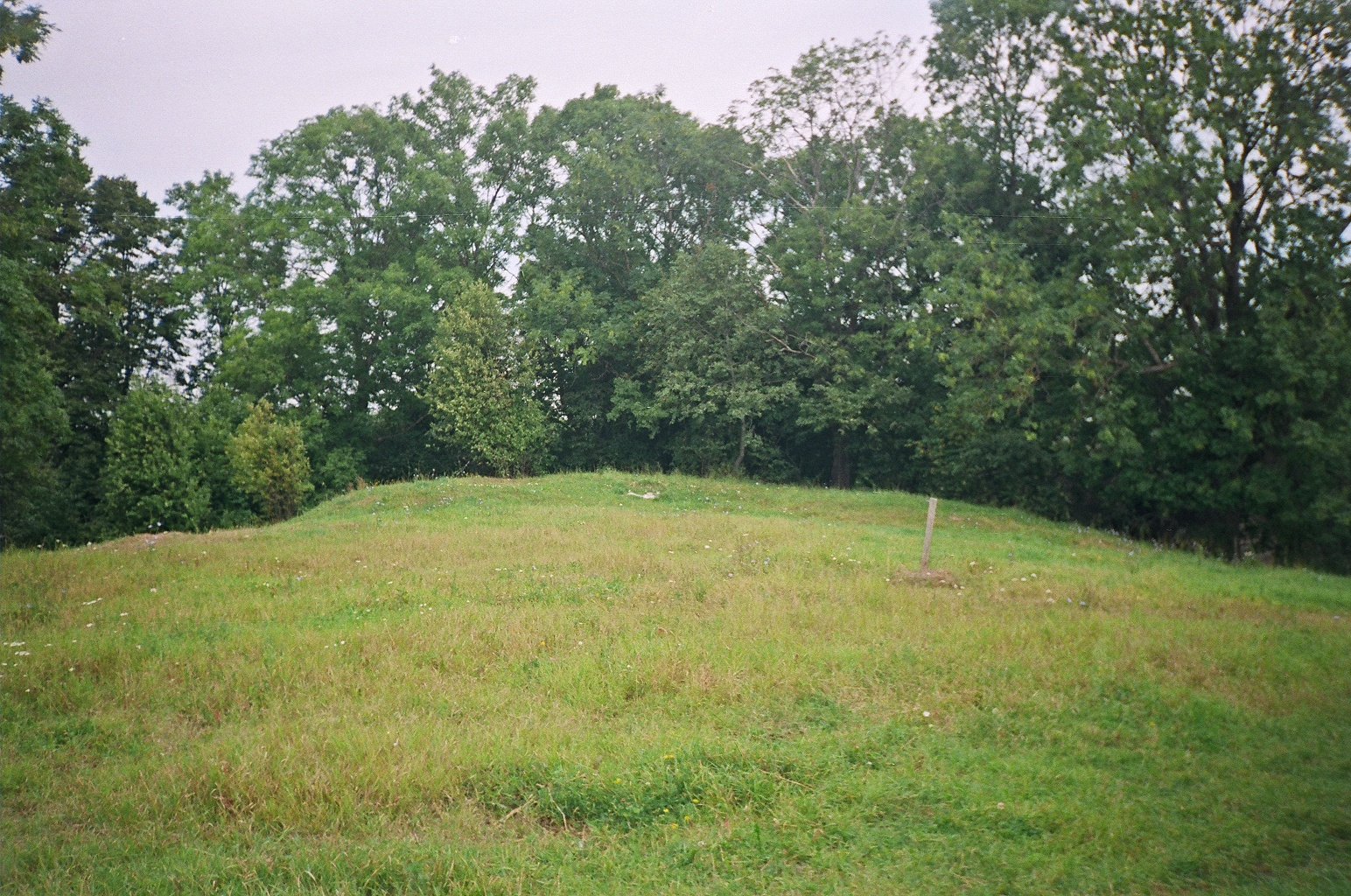 Noriūnų senkapis